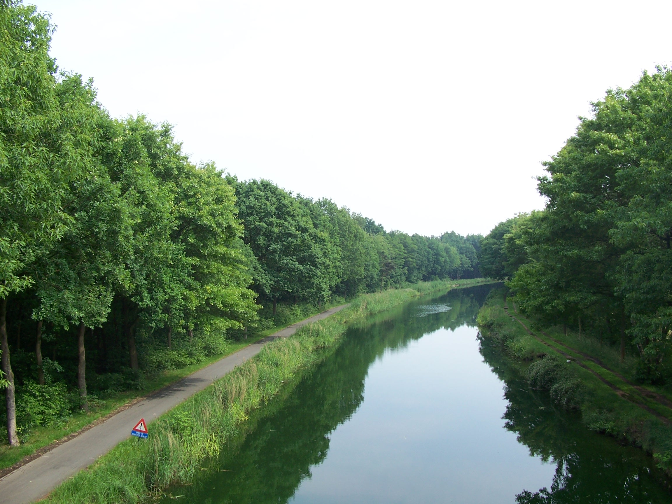 Het Kanaal naar Beverlo in de buurt van de Lommelse wijk Kerkhoven